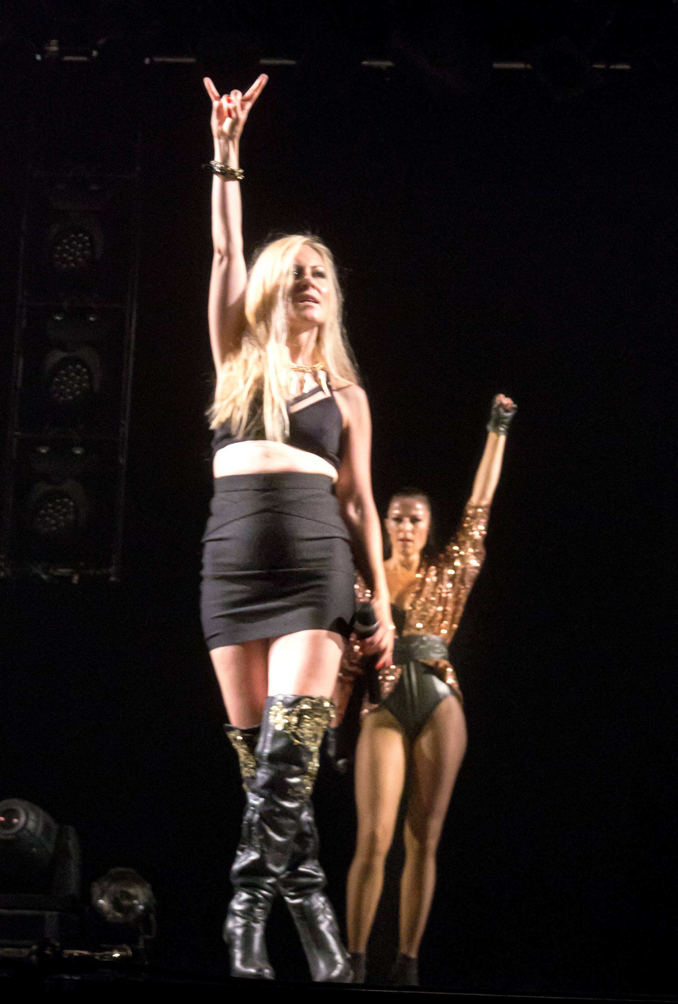 Bilder vom ZMF 2015, die Gala FORK am 15. Juli 2015